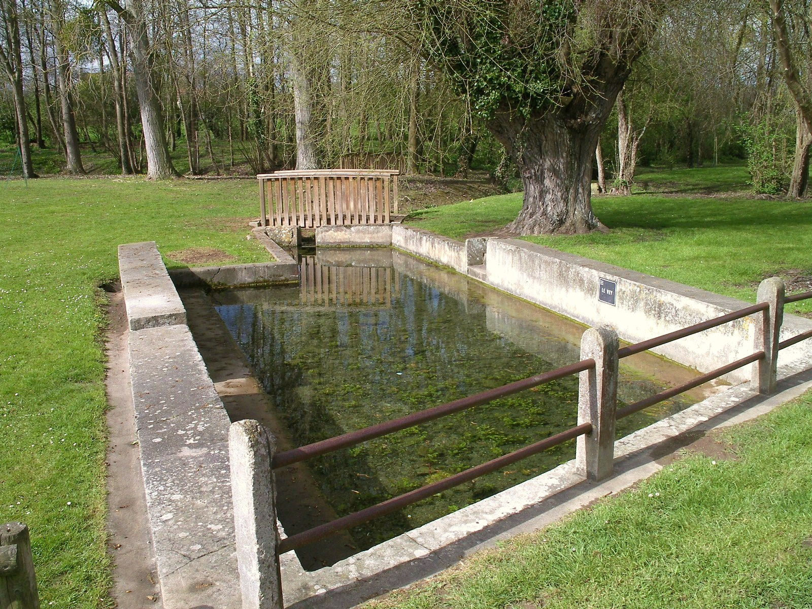 Lavoir sur le Vey à Cairon (Calvados)